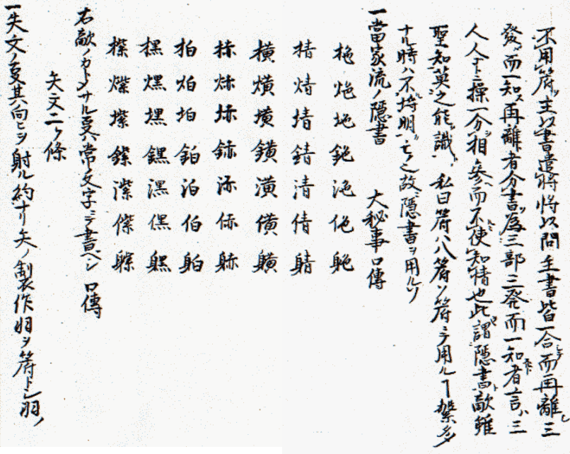 『万川集海』5巻より忍びいろはの図説。